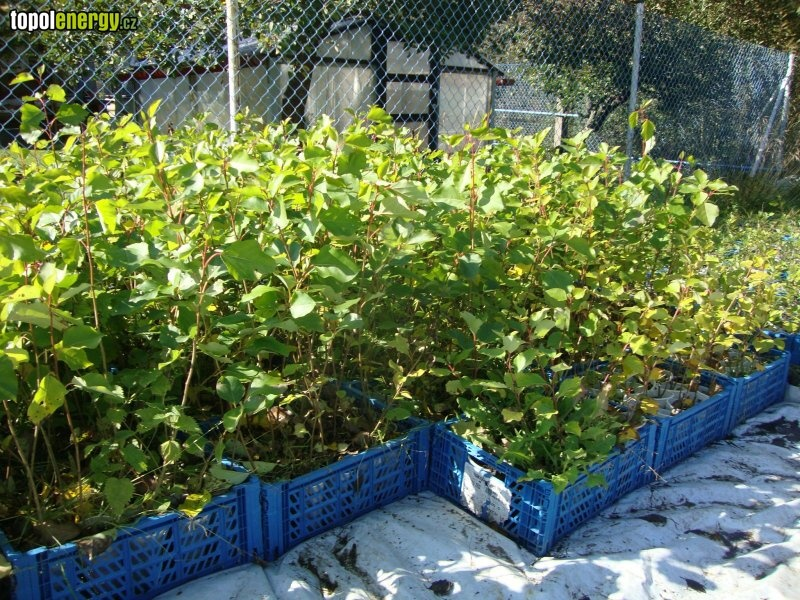 Kořenáče Japonského topolu. Připraveny k výsadbě na plantáž.